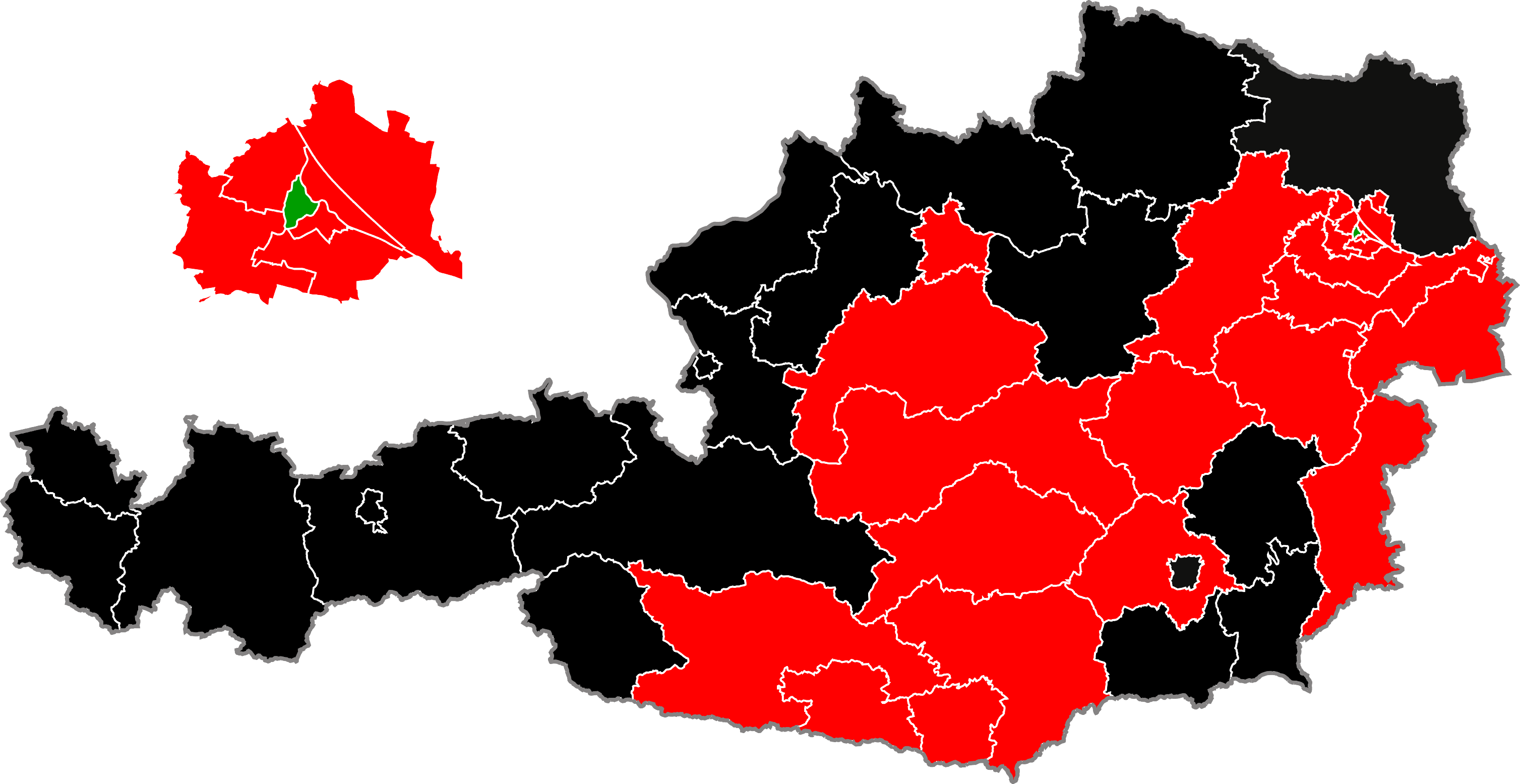 Nationalratswahl 2006, Stärkste Partei im jeweiligen Regionalwahlkreis